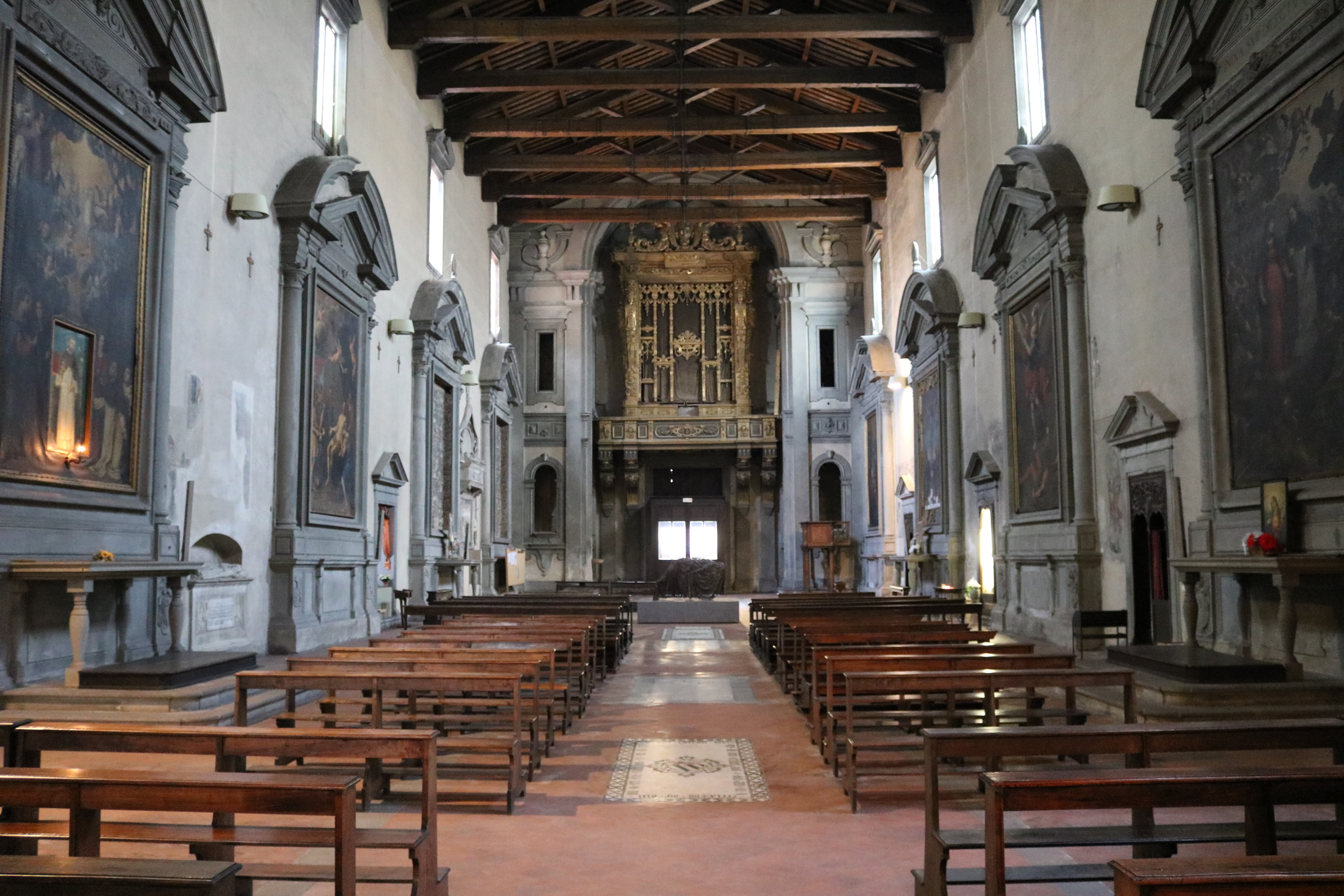 Interno della chiesa di San Domenico, Pistoia